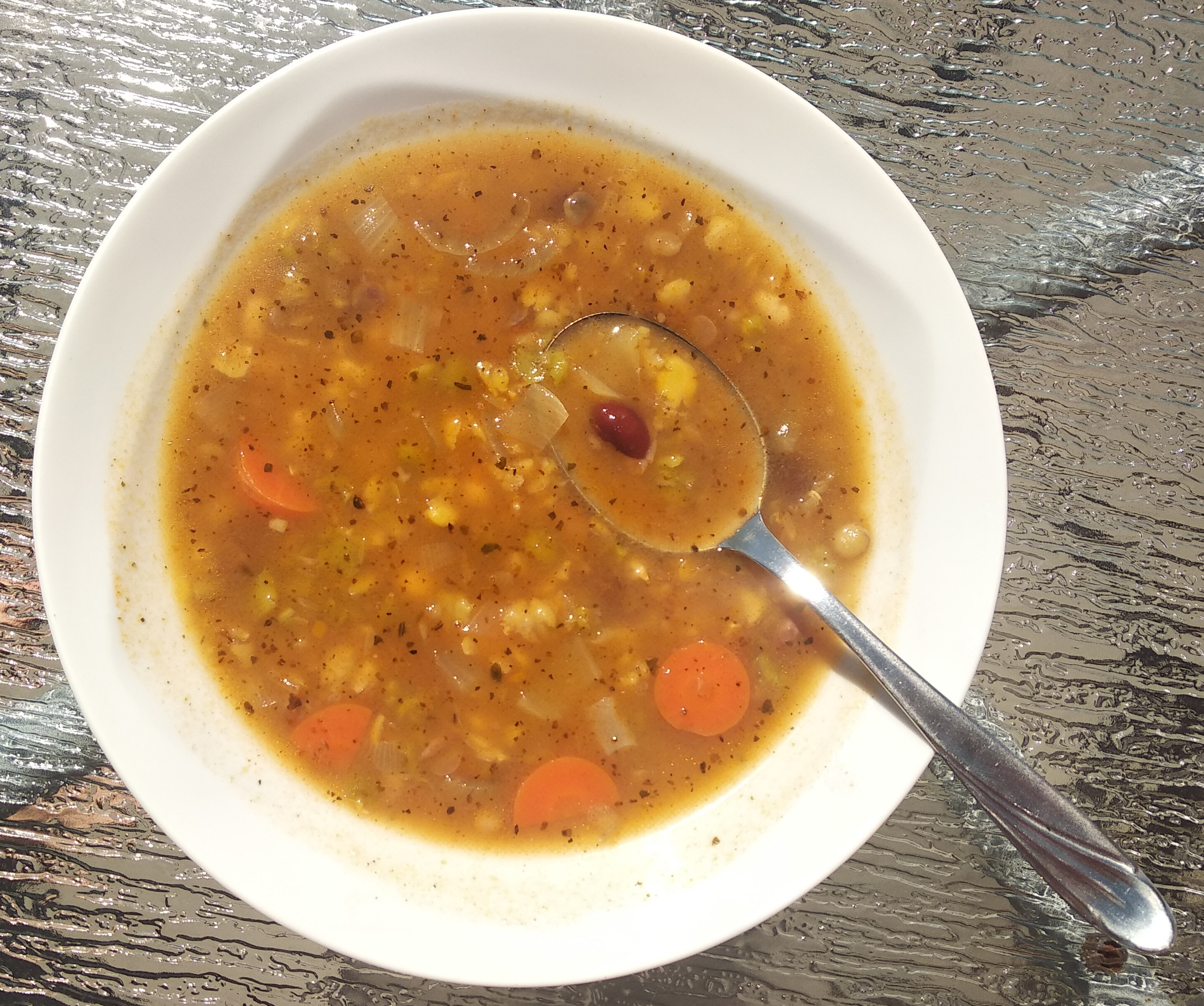 Hrstková polévka